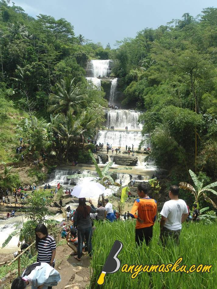 Curug Eksotis di Banyumas